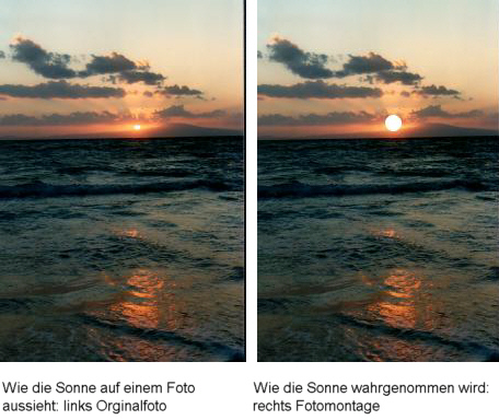 Beispiel-Foto zur Mondtäuschung in Griechenland